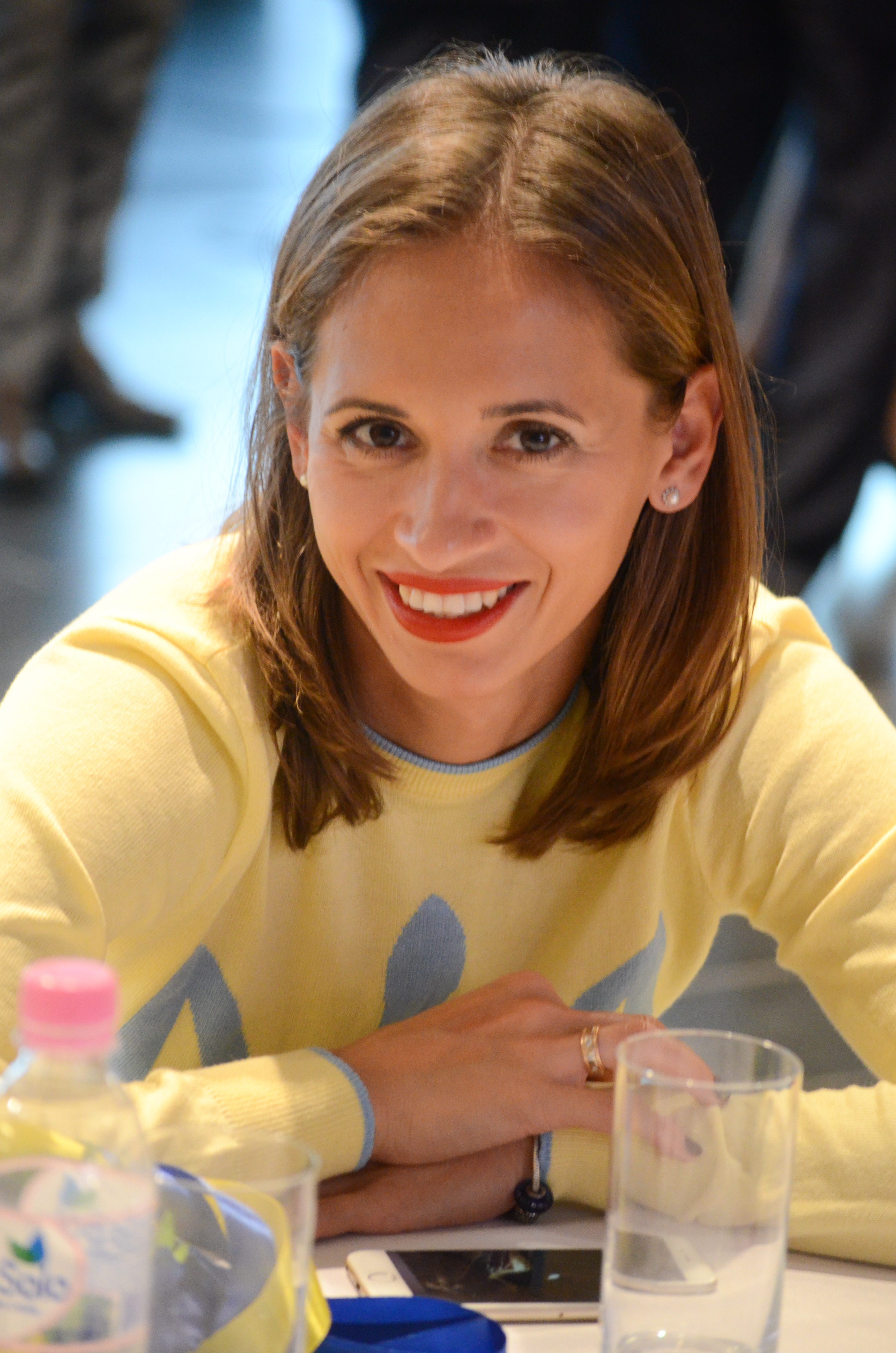 Зустріч Президента України з олімпійцями та паралімпійцями — учасниками Ріо-2016.